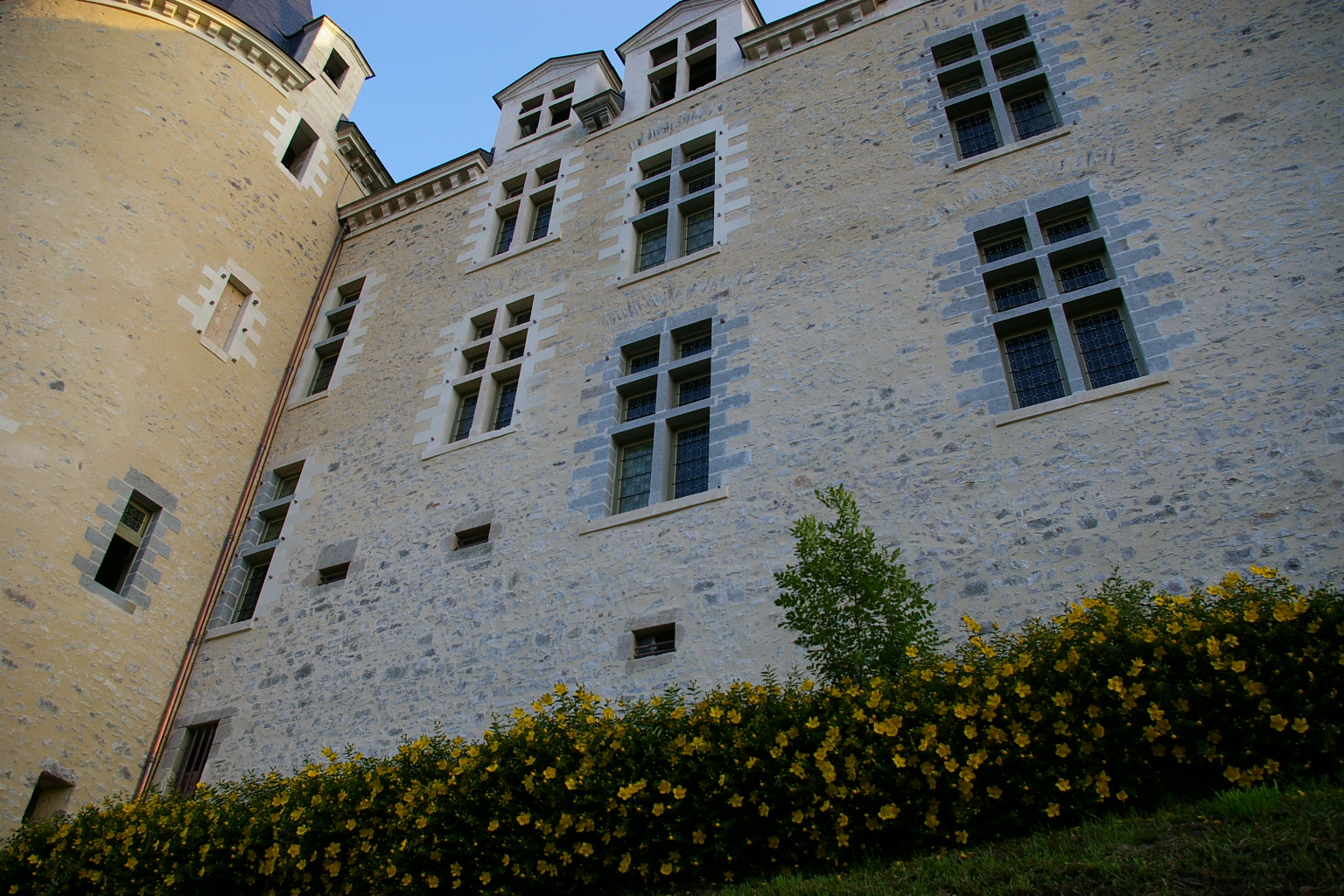 La façade du château de Sainte-Suzanne, côté promenade de la Poterne